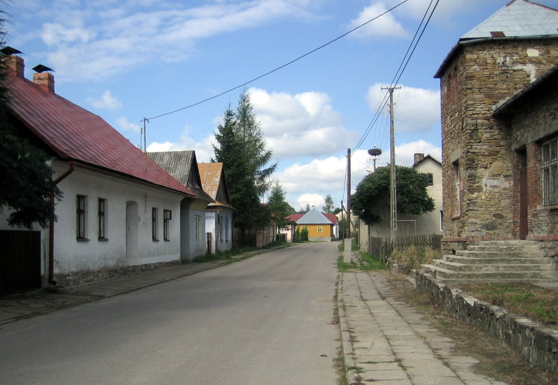 Poland, Rybotycze